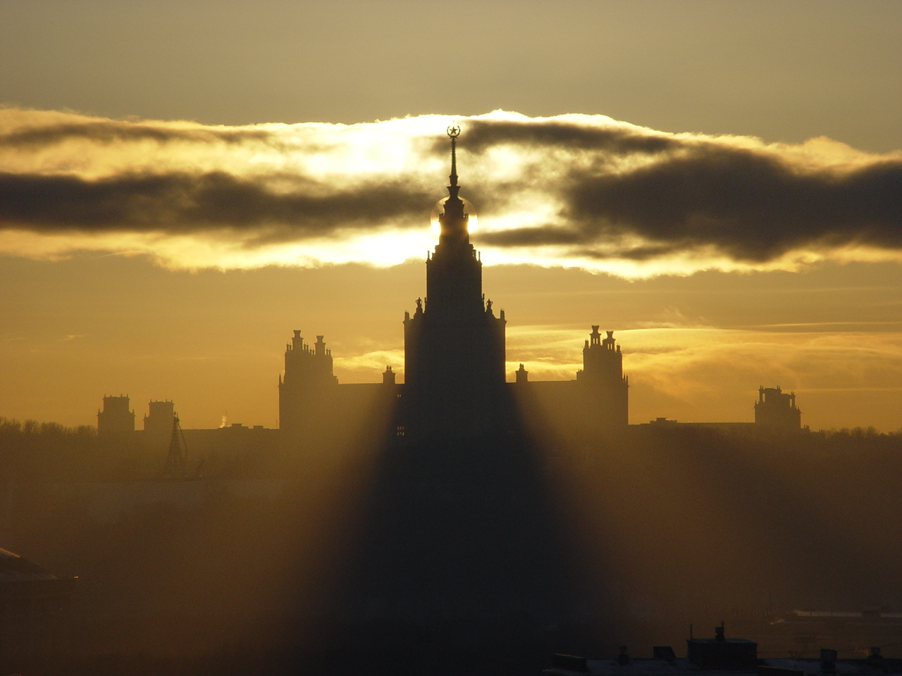 Солнечное затмение МГУ